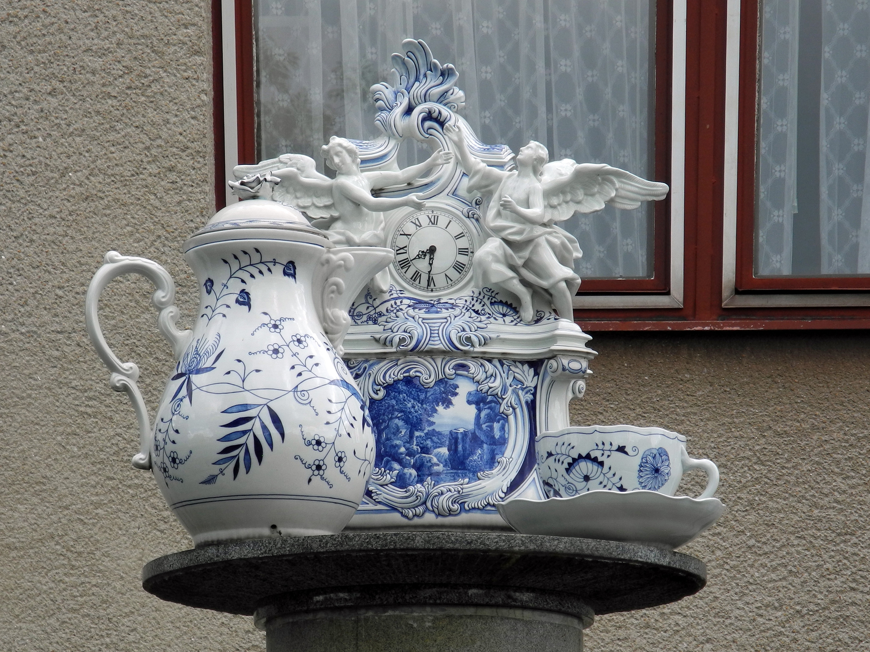 Porzellanplastik am Seiteneingang der Porzellanfabrik in Eichwald – Dubí, Tovární